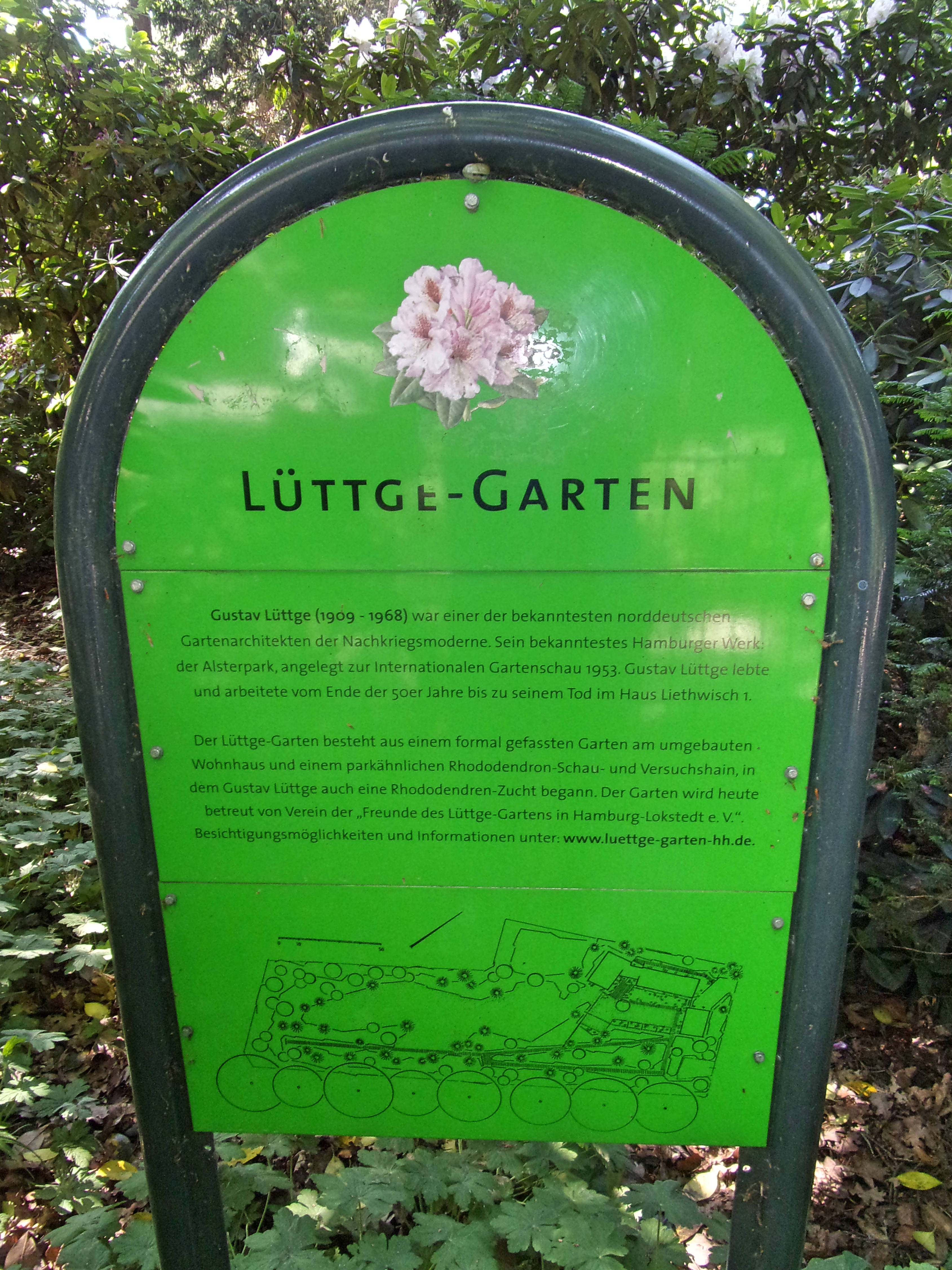 Info-Schild im Lüttge-Garten in Hamburg-Lokstedt zu Gustav Lüttge, der dort wohnte und arbeitete in seinem Garten. Gustav Lüttge legte gegen Ende der 50-er Jahre an seinem Wohnhaus den heutigen teilweise öffentlichen Garten an. Er war ein bekannter Gartenbau-Architekt, bedeutendes Werk der Alsterpark zur IGA 1953. This is a photograph of an architectural monument.